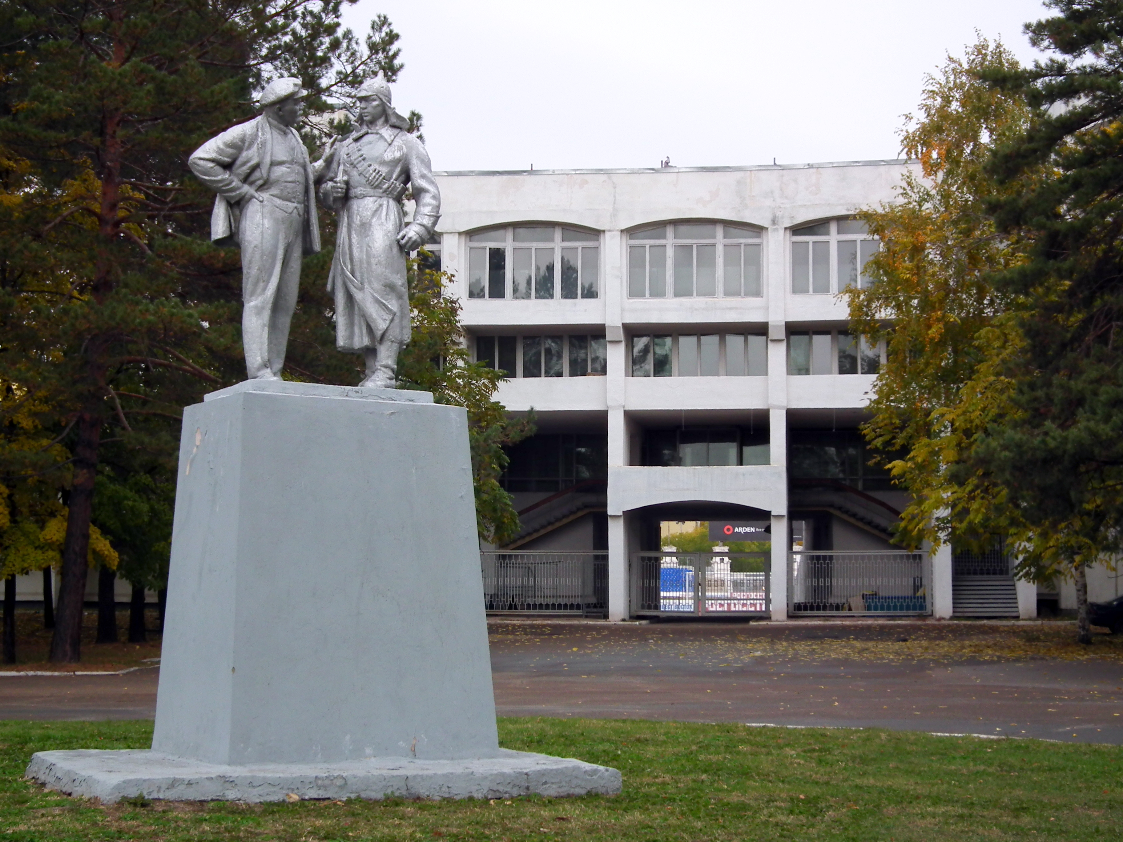 Ленин и боец обсуждают игру СКА - Энергии